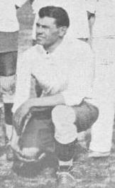 Selección de Uruguay en 1930. Arriba: Álvaro Gestido, José Nasazzi, Enrique Ballestero, Ernesto Mascheroni, José Leandro Andrade y Lorenzo Fernández. Abajo: Pablo Dorado, Héctor Scarone, Héctor Castro, José Pedro Cea e Victoriano Santos Iriarte.